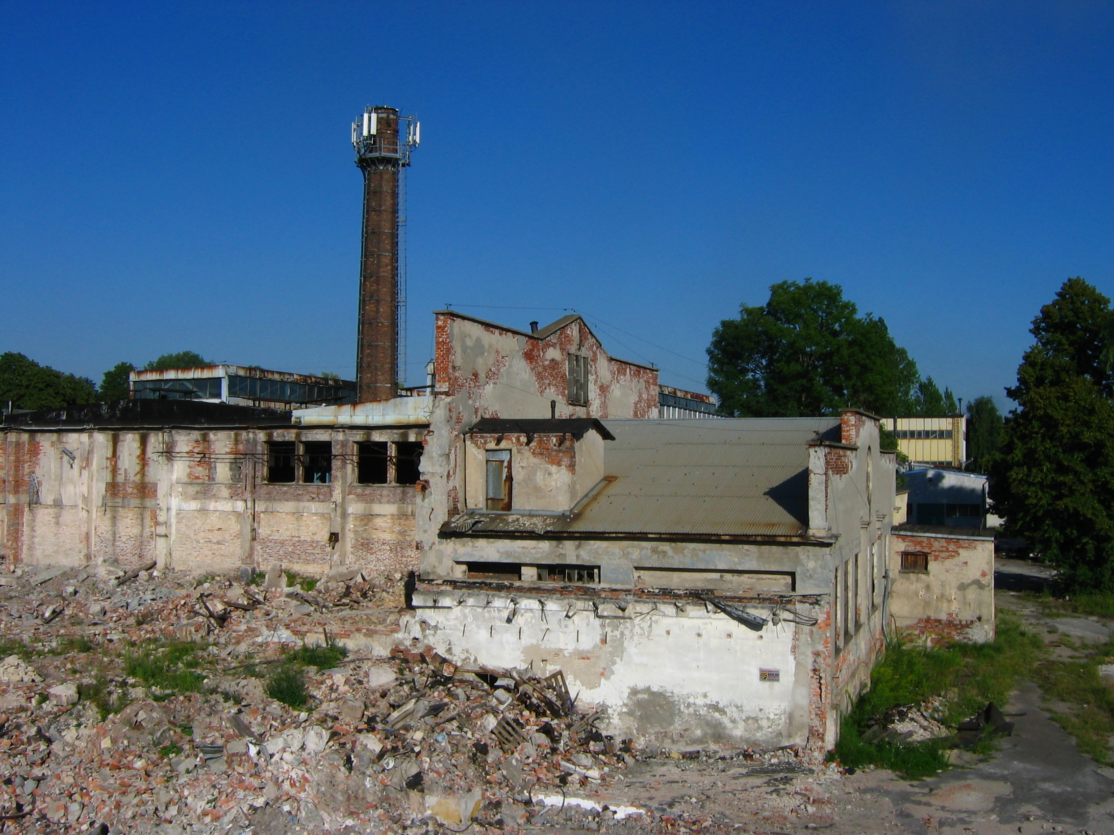 Dawna Huta Szkła w Ząbkowicach w Dąbrowie Górniczej